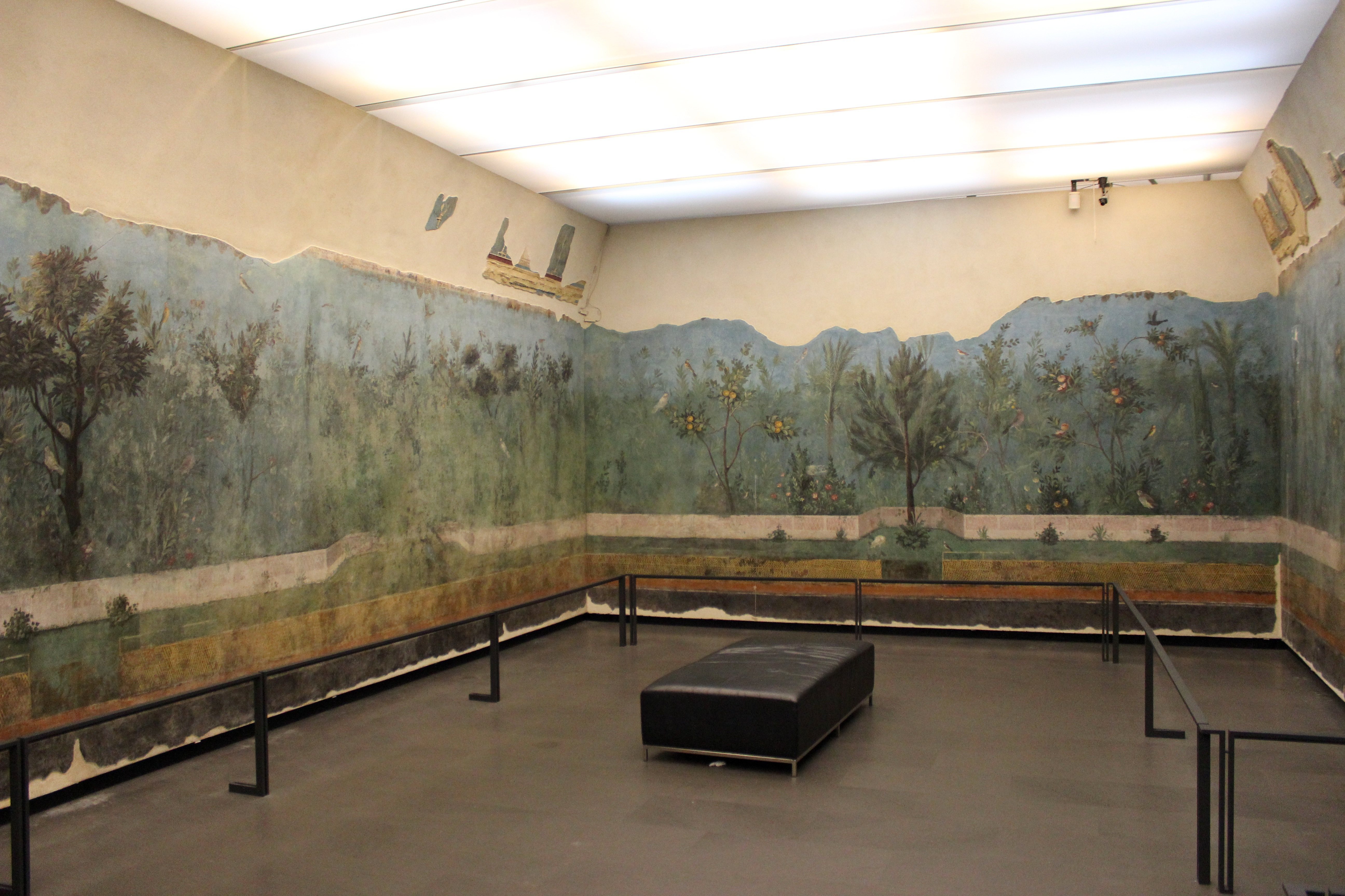 Palazzo Massimo alle Terme. Frescos de la Villa de Livia "ad gallinas albas".